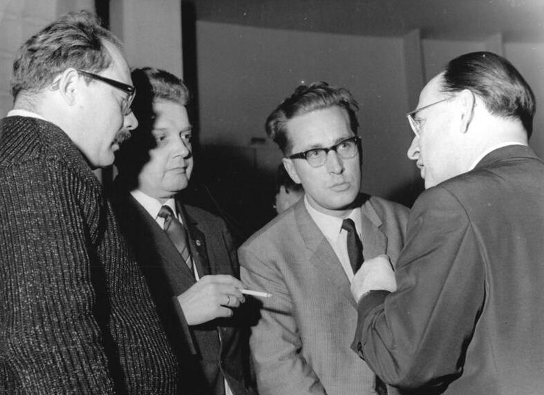 Zentralbild Farnke 4.11.1966 Berlin: Gespräch nach Abschluß der 1. Jahreskonferenz des Deutschen Schriftstellerverbandes Aufgeregte Gespräche, hier zwischen (v.l.n.r.) Schriftsteller Bernhard Seeger, Prof. Dr. Hans Koch, Stellvertretender Vorsitzender des DSV, Heinz Plavius, Stellvertretender Chefredakteur der Zeitschrift "Neue Deutsche Literatur", und Kulturminister Klaus Gysi, gab es auch noch nach dem offiziellen Abschluß der 1. Jahreskonferenz des Deutschen Schriftstellerverbandes am 4.11.1966 in der Kongreßhalle am Berliner Alexanderplatz.